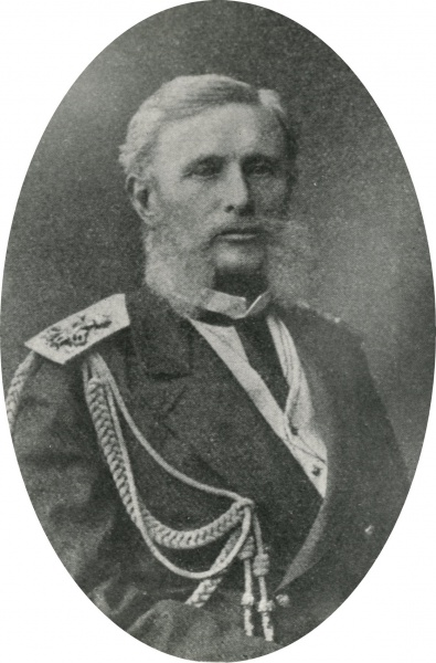 Иван Иванович Бутаков (1820—1882)